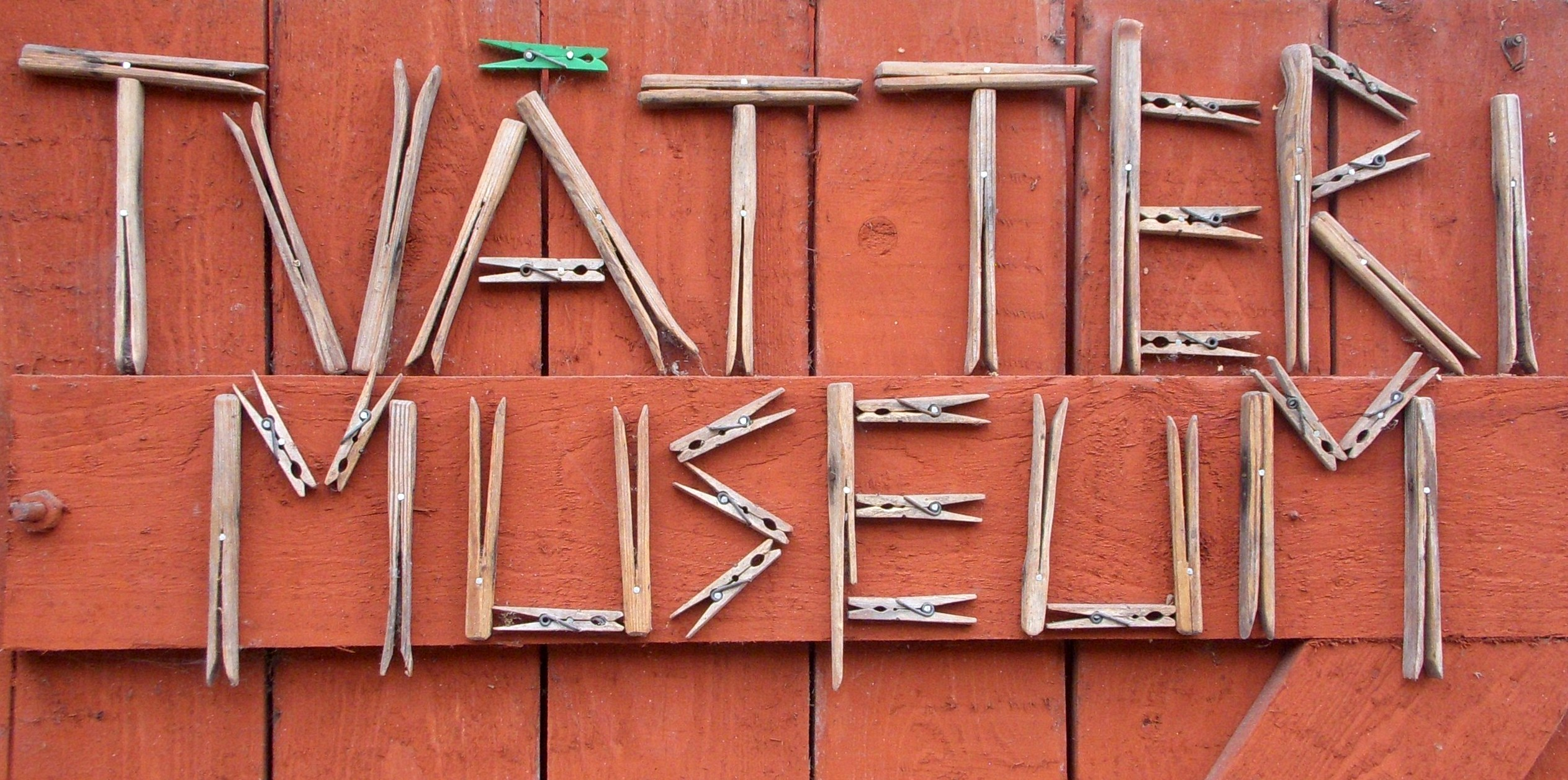 Hagalunds Tvätterimuseum i Huddinge, skylt